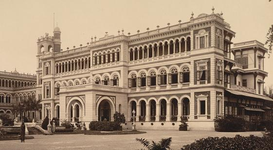 Makarpura Palace